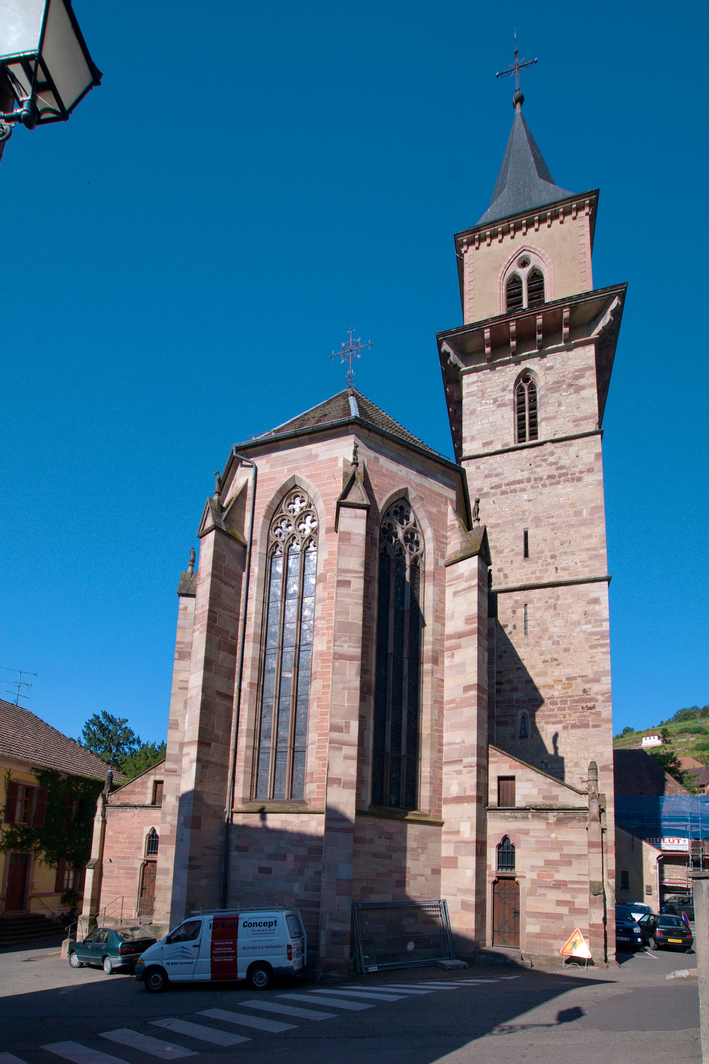 Église Saint-Gregoire de Ribeauville, Rue du Château (Classé, 1994) .